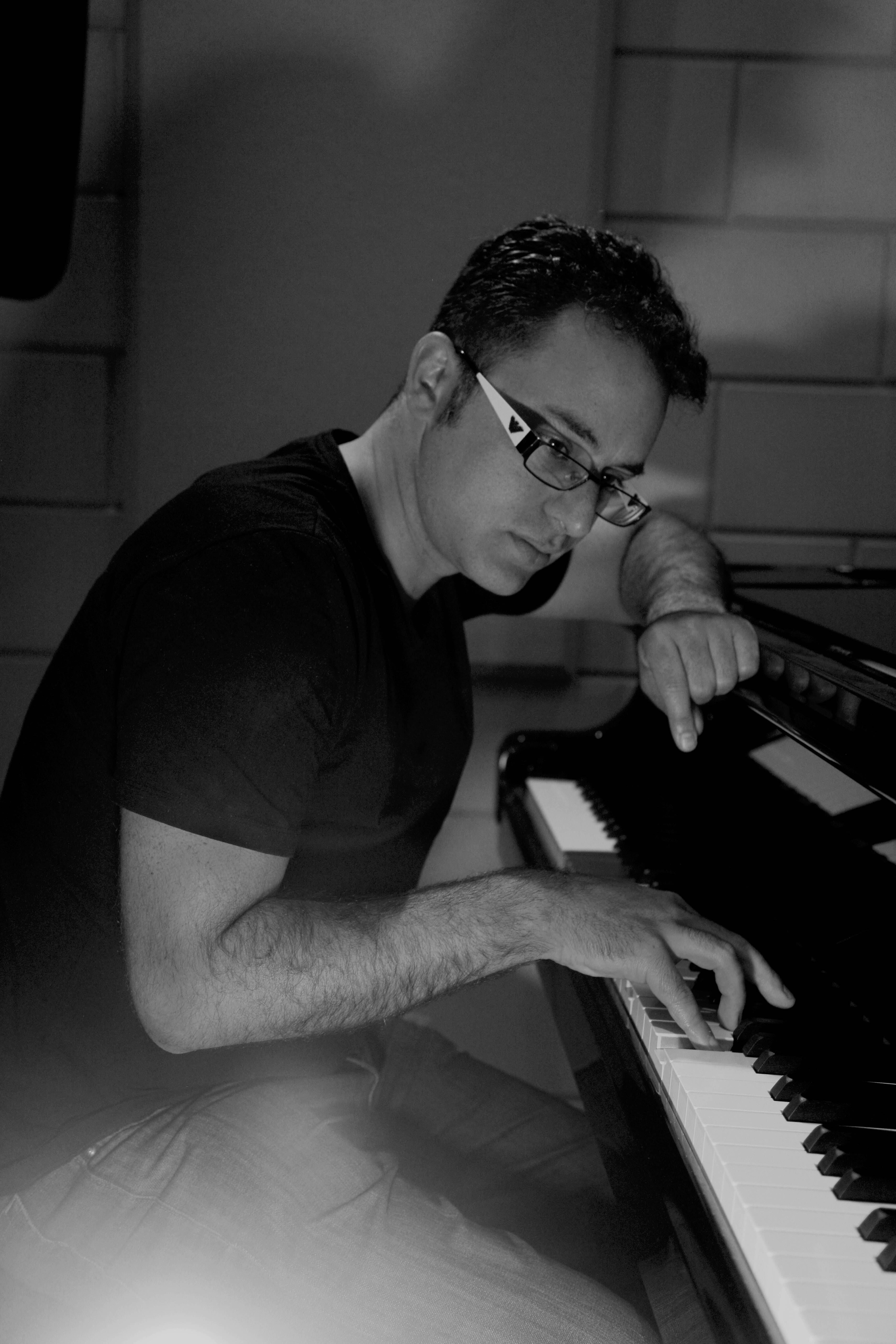 גלעד חצב ופסנתר כנף